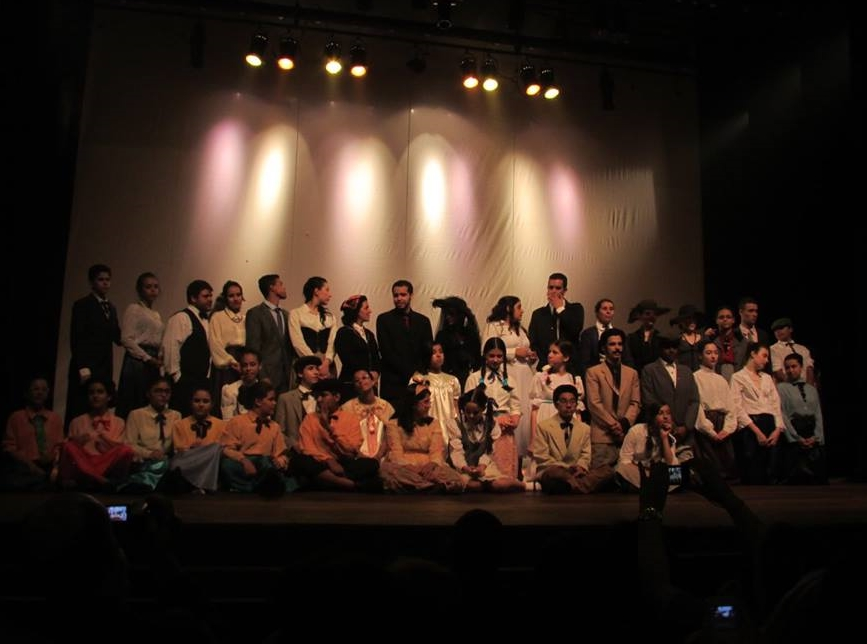 Atores da academia pós-apresentação da peça "Nossa Cidade" de Thornton Wilder, no Theatro D. Pedro